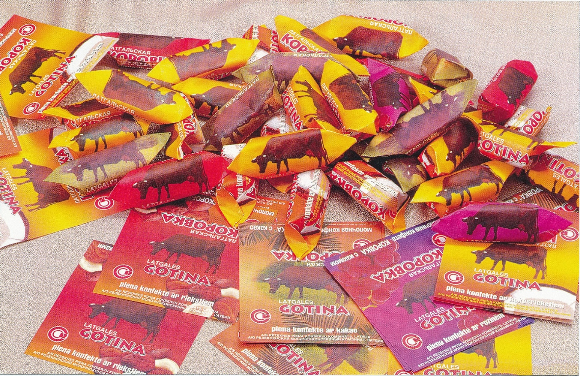 RPKK ražotā Latgales Gotiņa